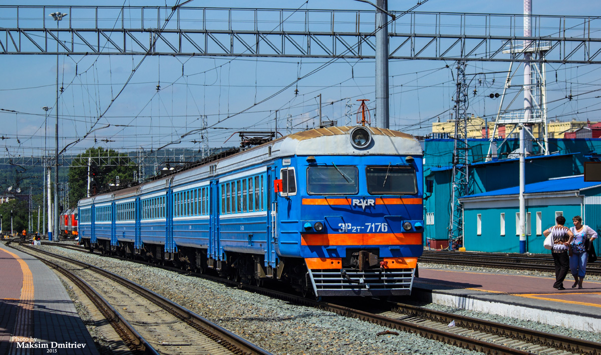 Электропоезд построен в 12-вагонной составности С завода поступил в депо Новокузнецк Кемеровской ж.д. Вагон ЭР2Т-717604 — в сборном составе ЭР2Т-2208/2209